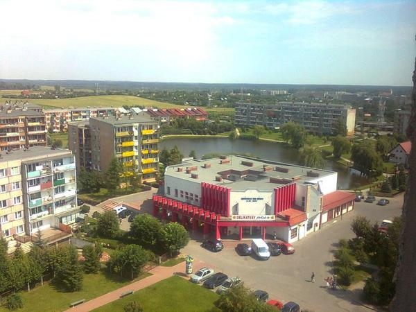 Budynek "Okrąglaka" przy ul. Grodzieńskiej 10 w Ełku i okolica